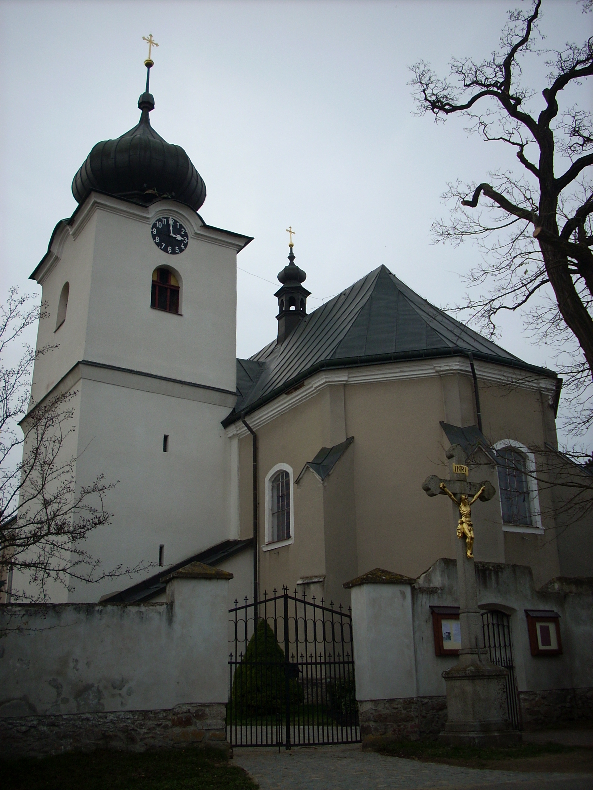 Nížkov, kostel svatého Mikuláše s bránou